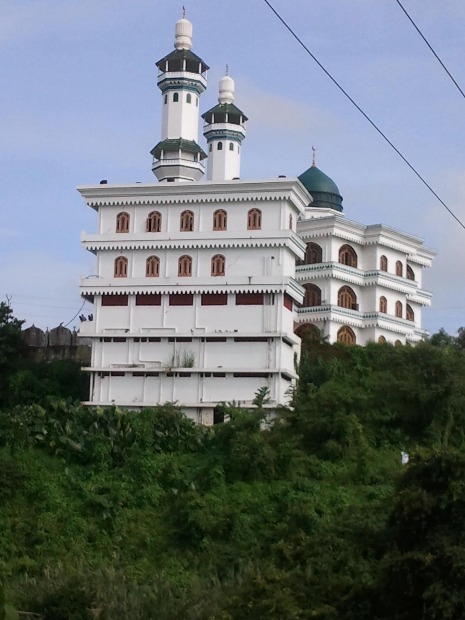 വലിയ ജുമുഅത്ത് പള്ളി (പുതുക്കി പണിതത്)